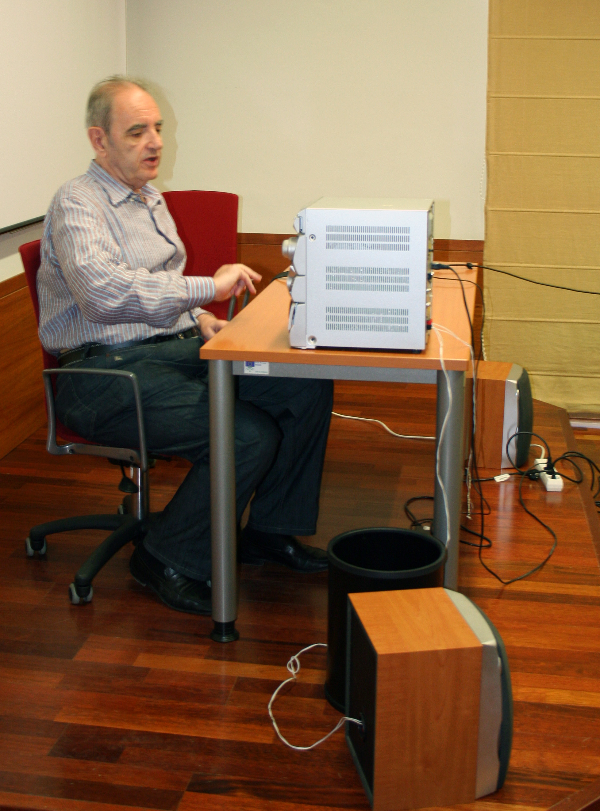 El músico español Tomás Marco, Premio Nacional de Música, en en el curso de verano de la Universidad Internacional de Andalucía "Música y Globalización", celebrado en Baeza en agosto de 2007.